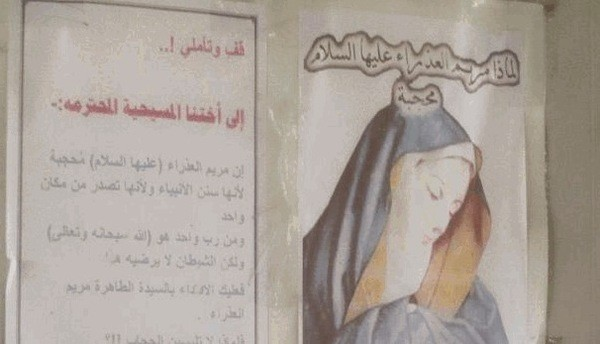 Affiche chrétiennes voile bagdad 2015